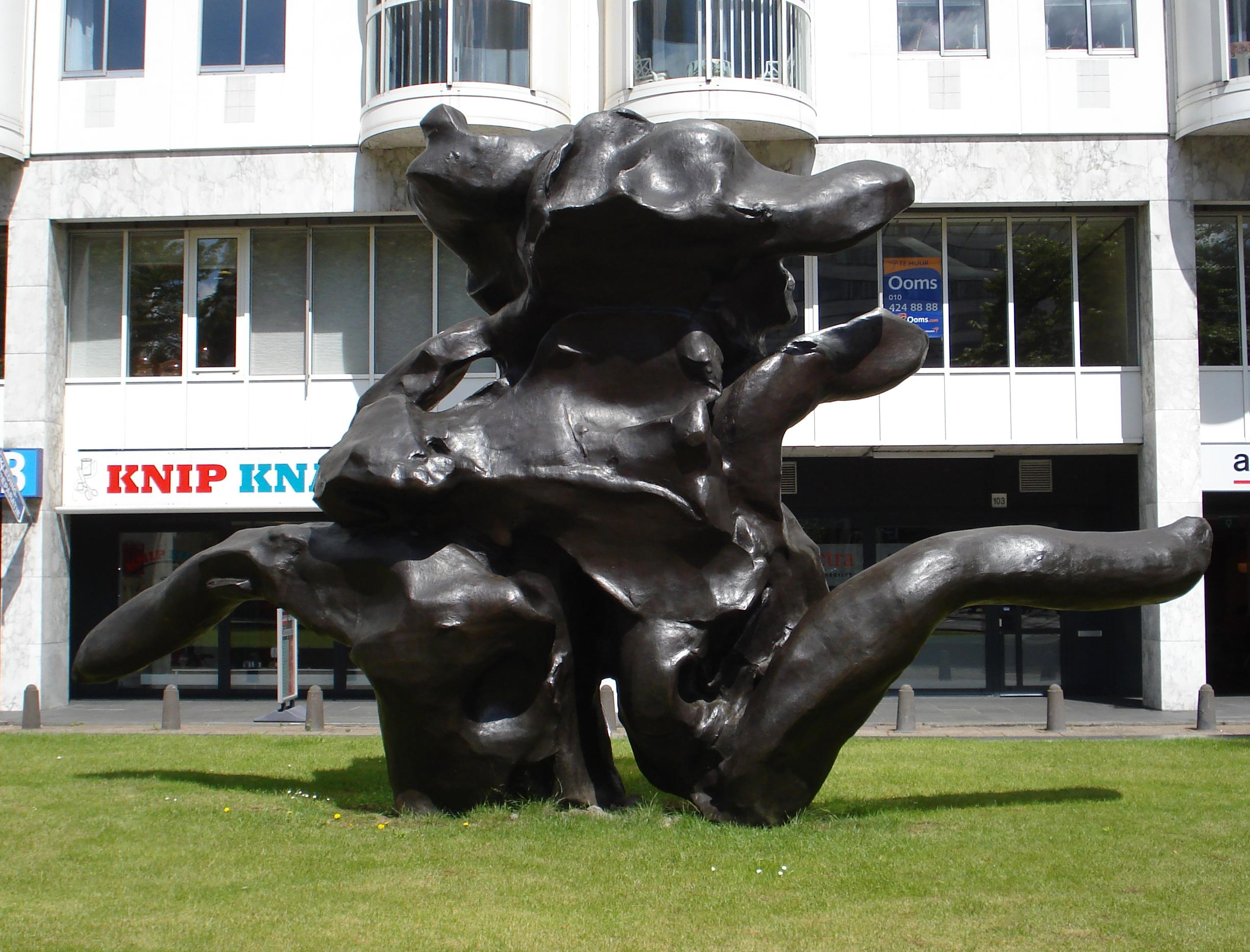 Rotterdam weena. Kunstwerk "Standing figure" van Willem de Kooning. Rotterdam/The Netherlands.